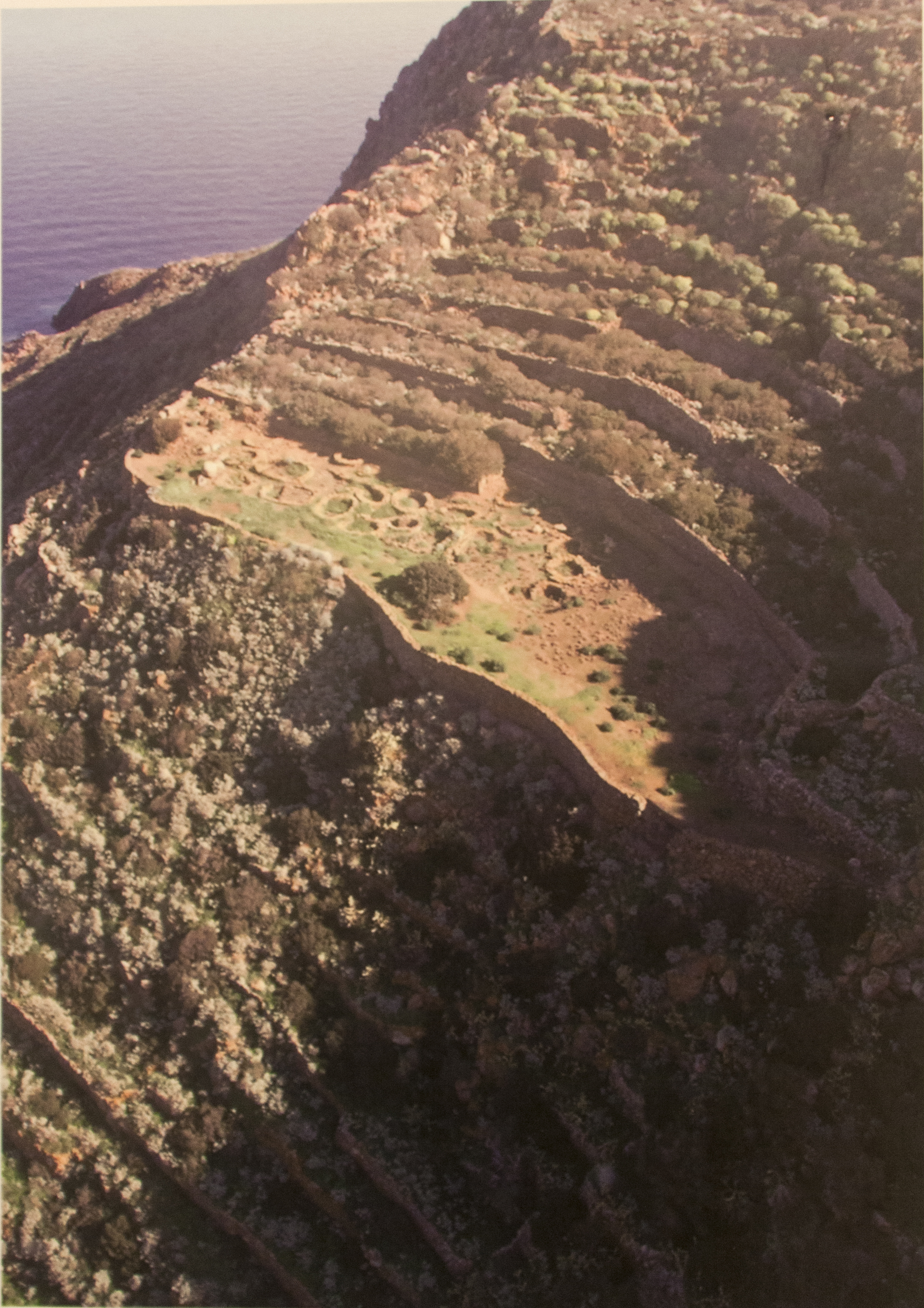 Villaggio di Capo Graziano